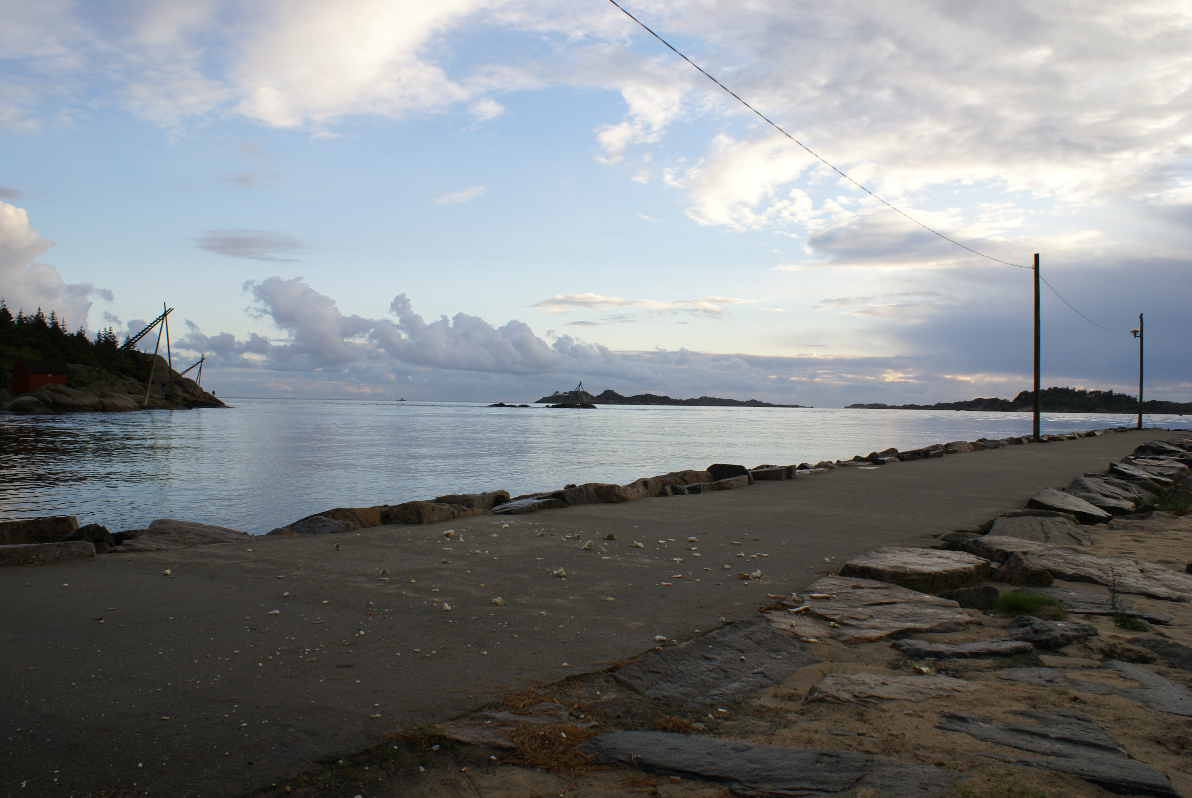 Innselingen til Mandal